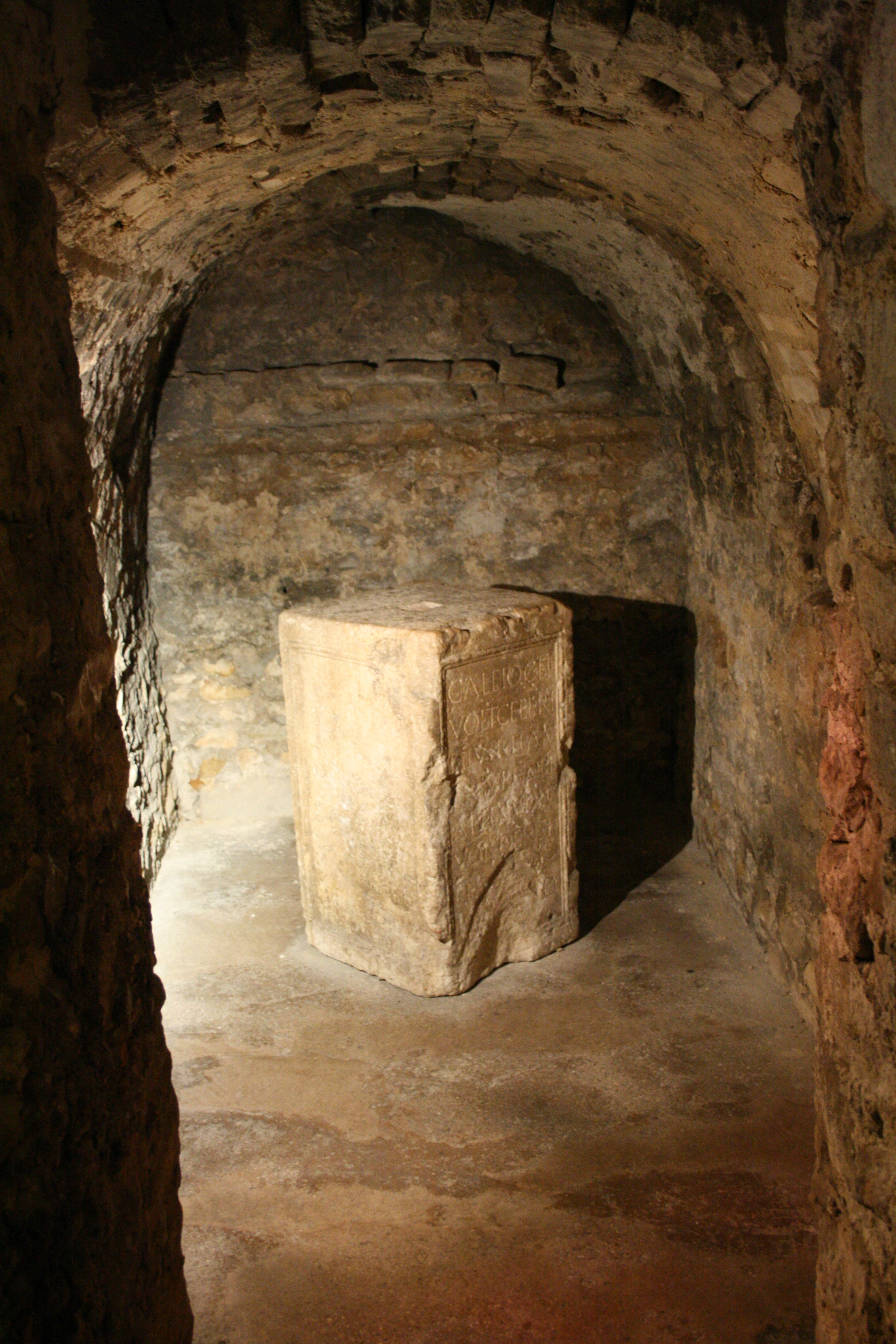 Cathédrale Sainte anne d'Apt, département du Vaucluse, France. Crypte inférieure.